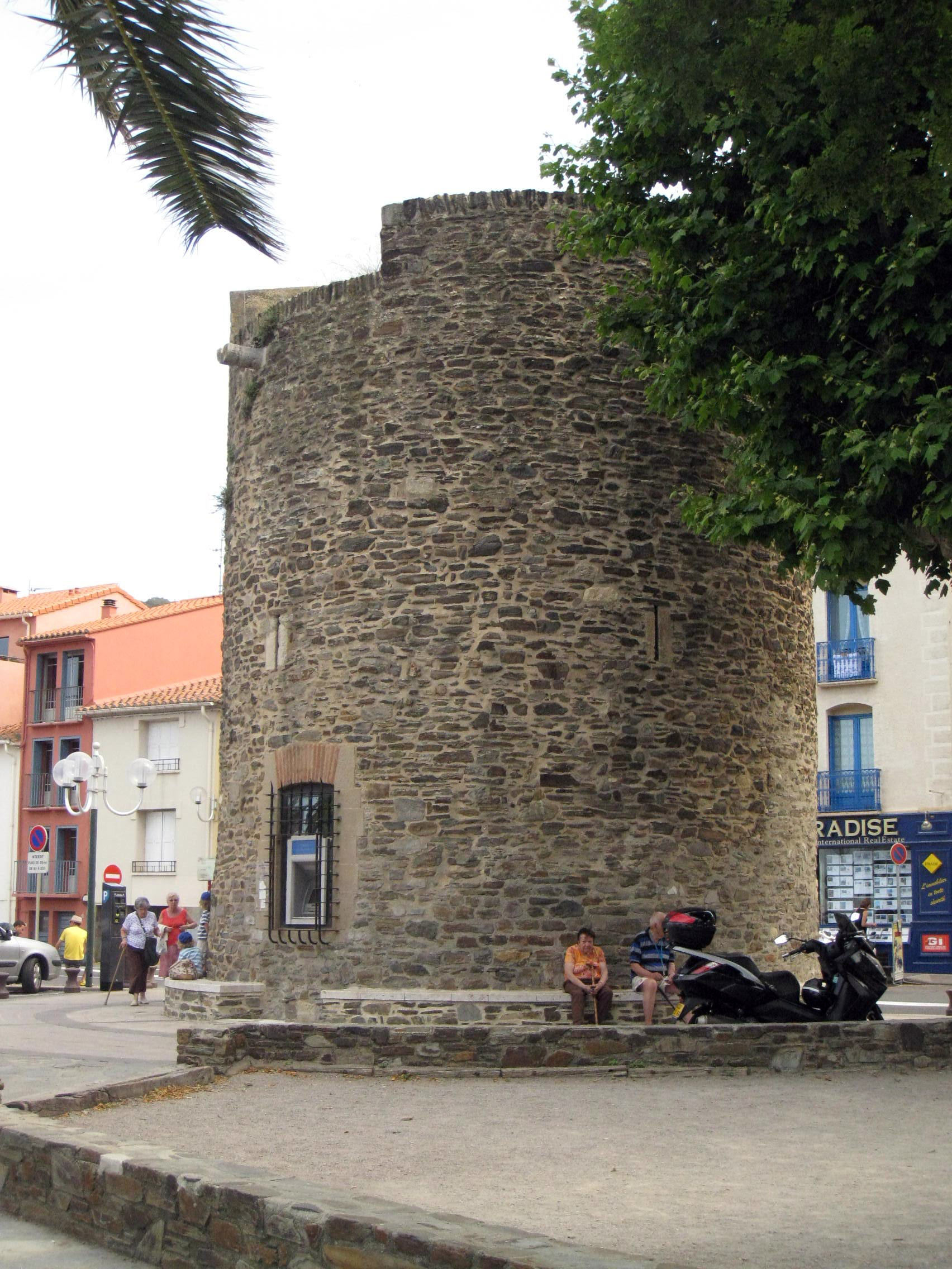 Fortificació de l'Artilleria i muralles (Cotlliure)